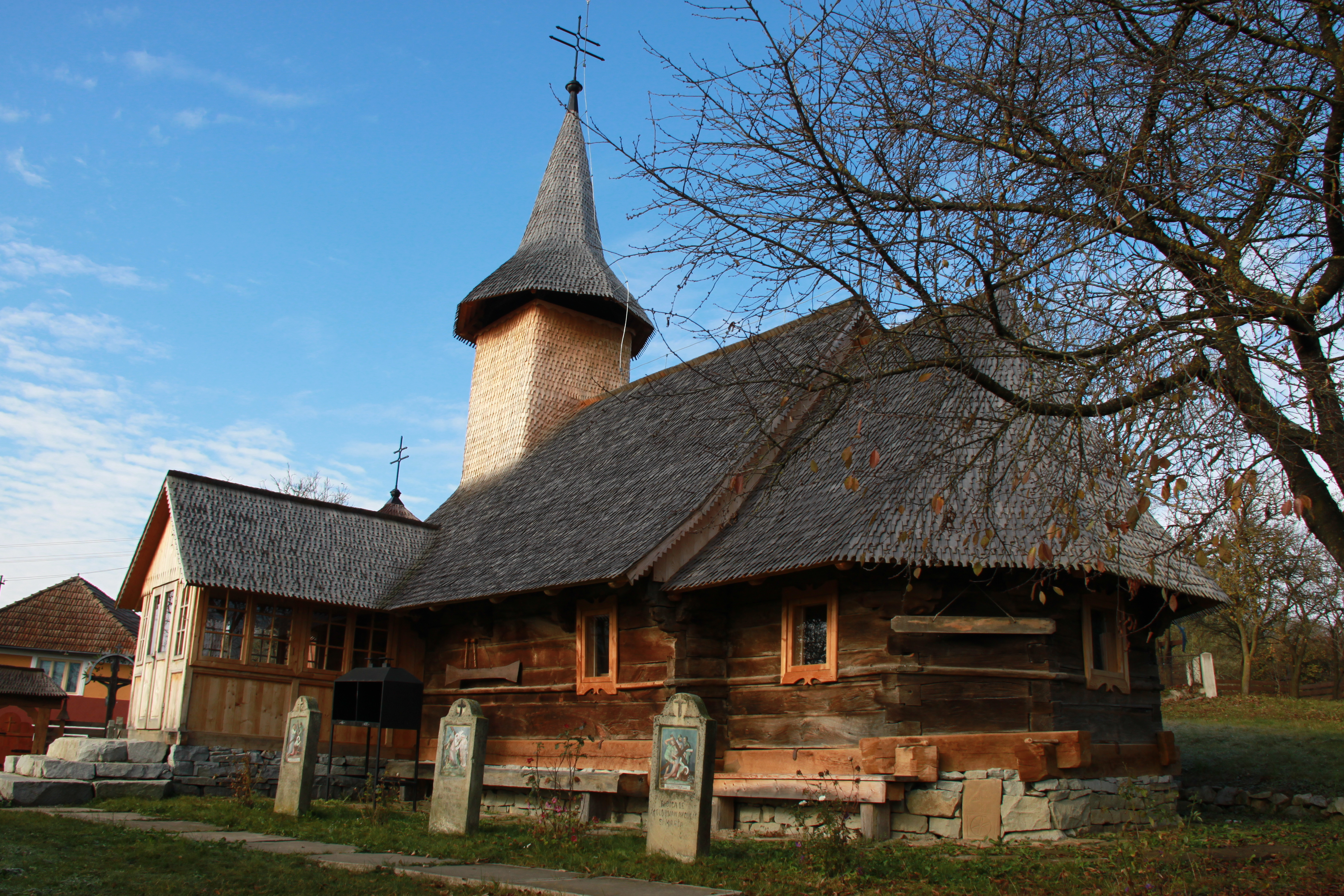 October 2010